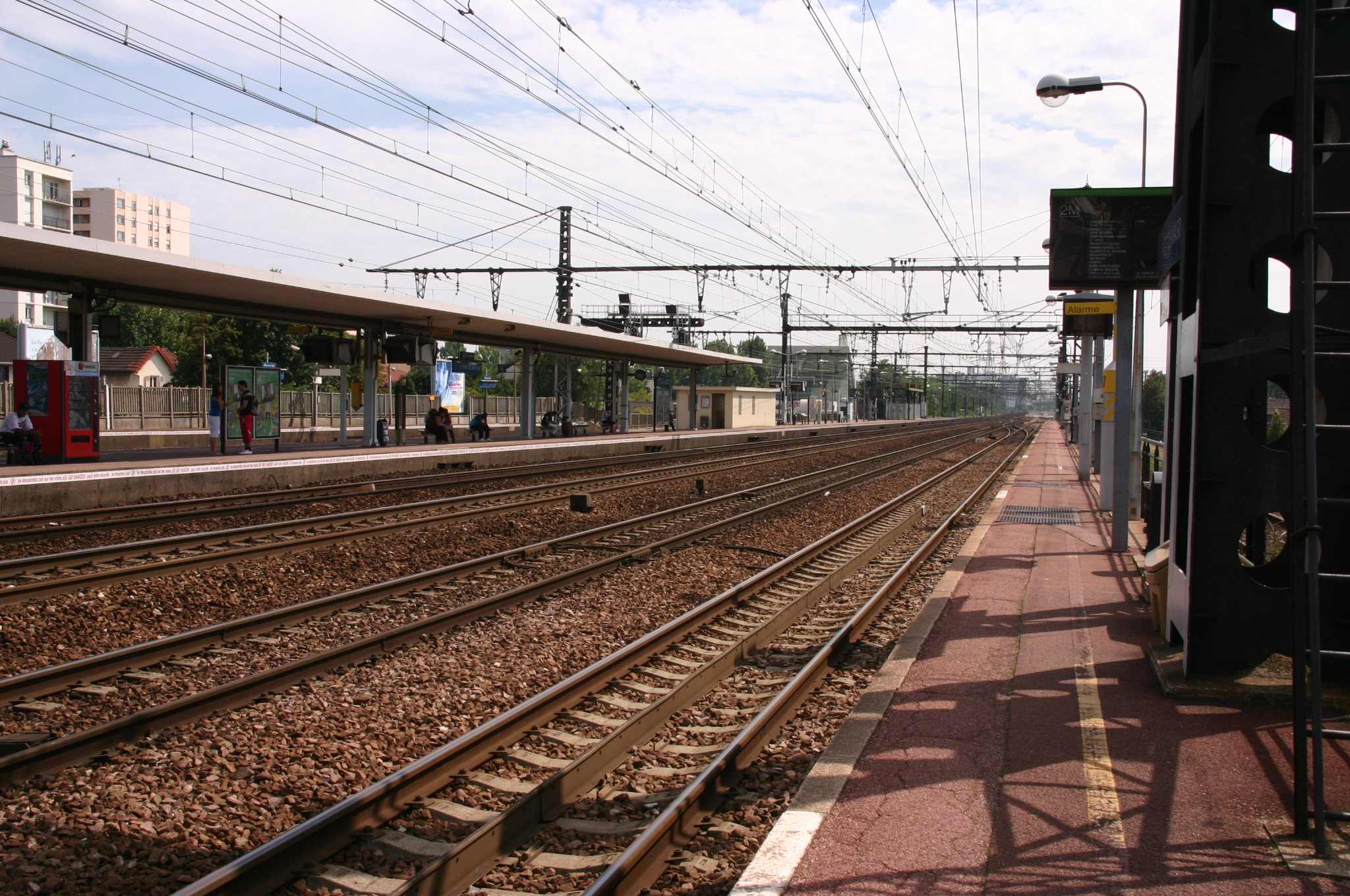 La Gare du Vert-de-Maisons, Maisons-Alfort / Alfortville, département du Val-de-Marne, France